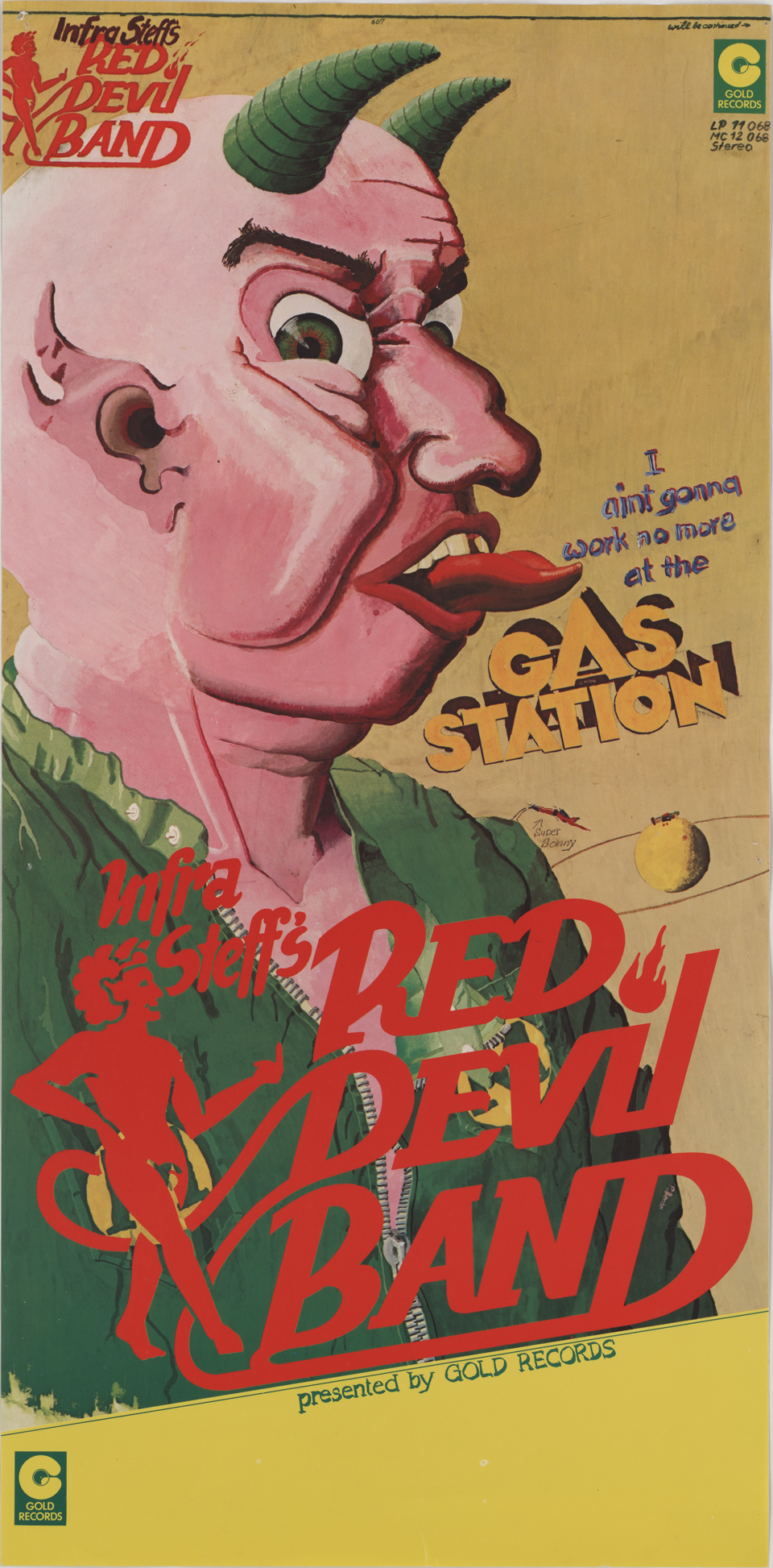 Die Red Devil Band wird im Oktober 1977 gegründet und hat Proben und Auftritte in den Jahren 1978 und 1979. Die erste LP entsteht während einer Dauer von Oktober 1978 bis Februar 1979, die Vertragsunterzeichnung mit Produzent Bruno Spörri findet am 17. März 1979 statt, diejenige der Plattenfirma Gold Records am 30. März 1979. Schlussendlich, am 17. Juni 1979, kann die Plattenpremiere in Form einer Mitternachtsshow im Stadttheater St.Gallen durchgeführt werden.